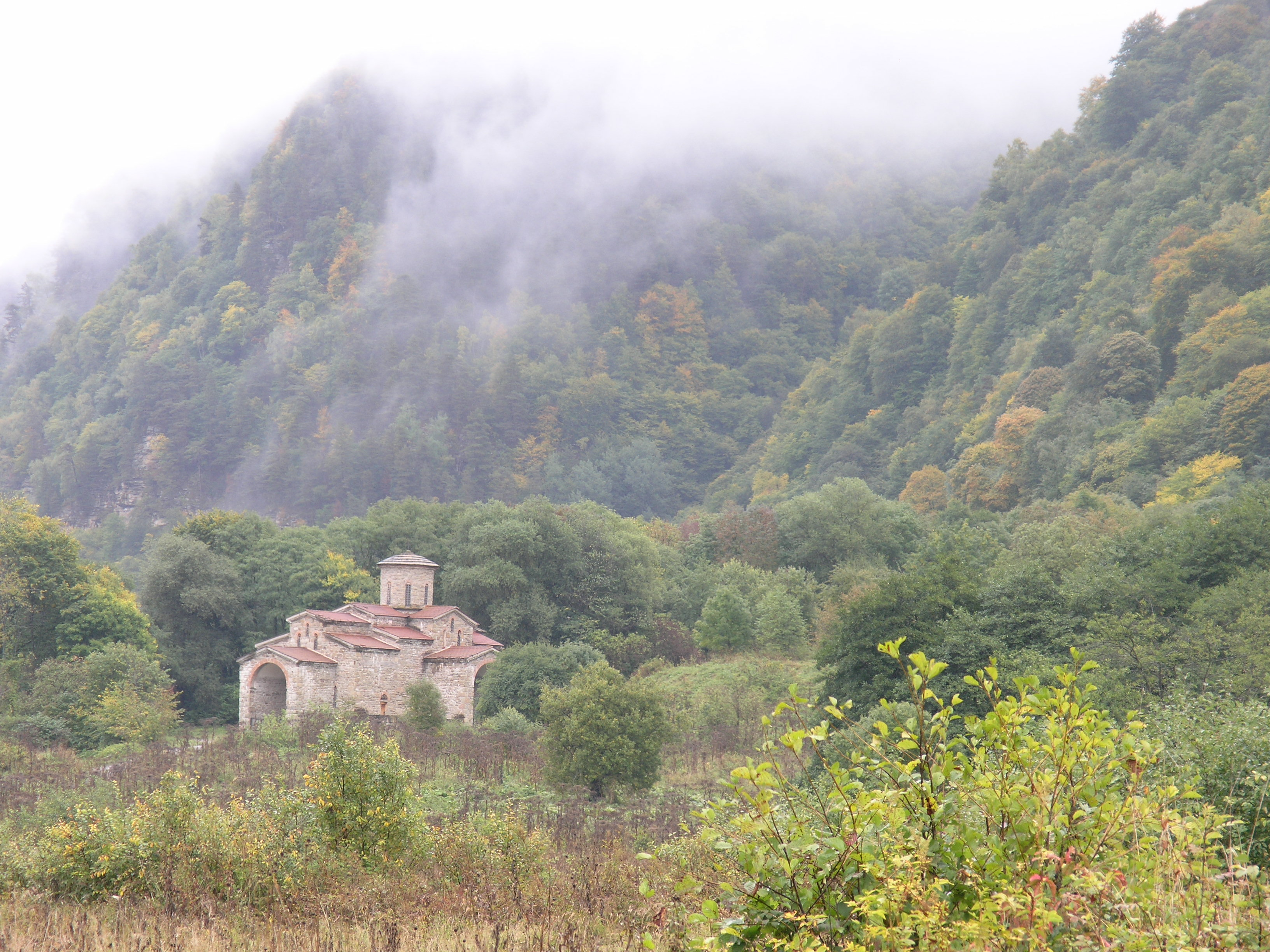 Никольскаяская церковь